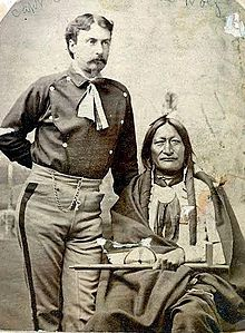 Hefe cara larga LittleHawk